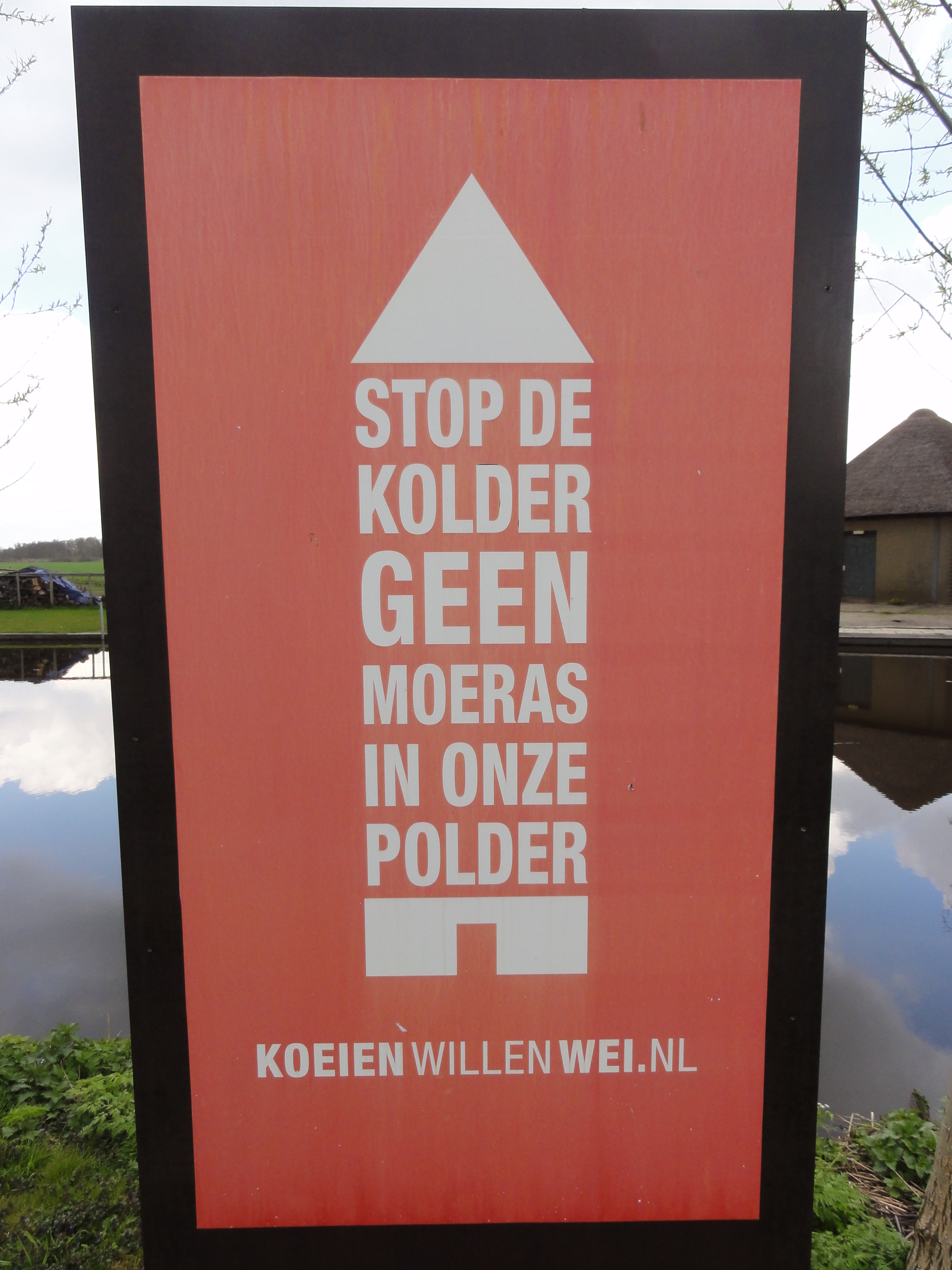 Protestbord langs de rivier de Meije voor de actie actie ‘Stop de kolder, geen moeras in onze polder’